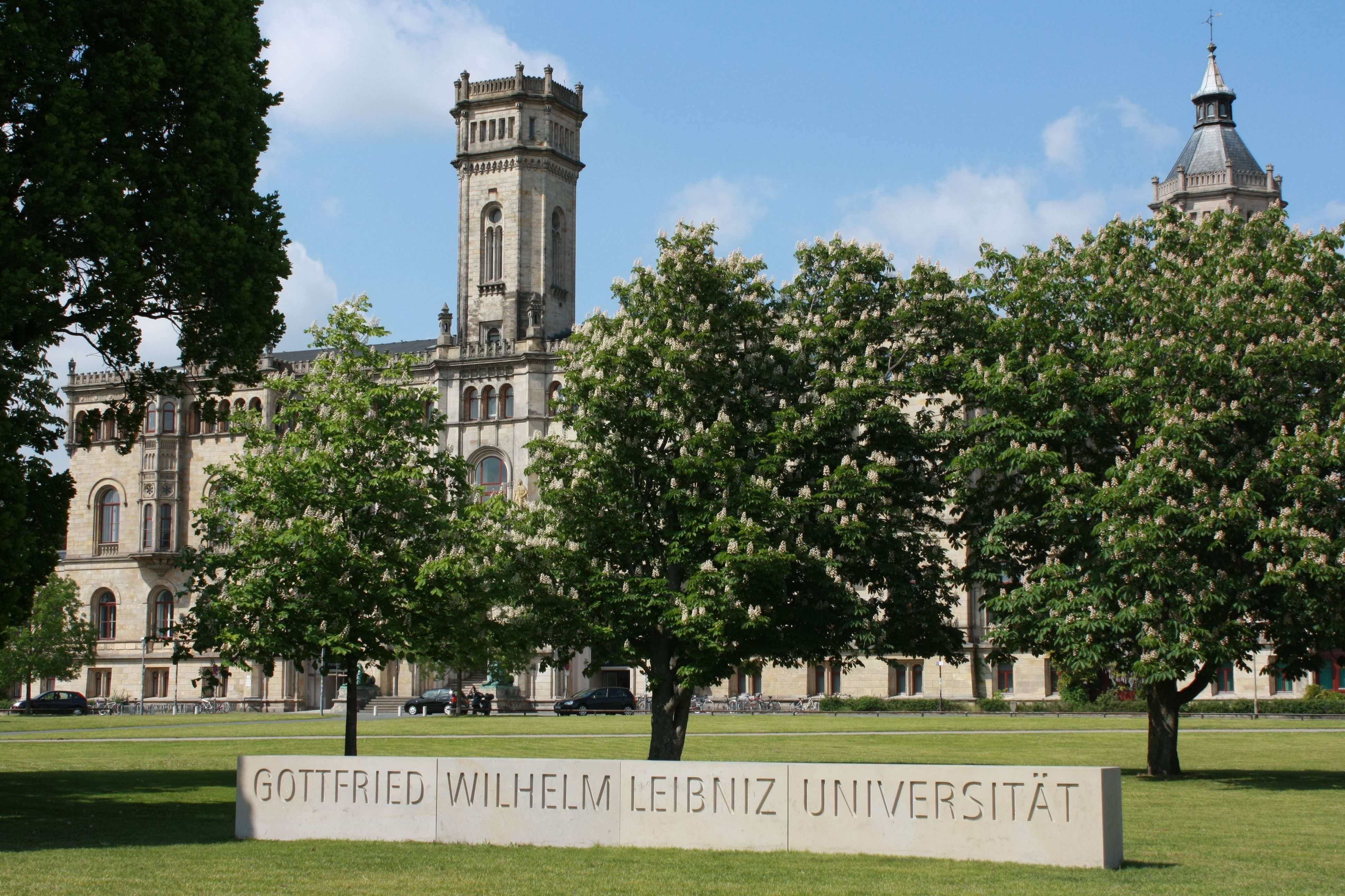 Welfenschloss Hannover, Hauptgebäude der Gottfried Wilhelm Leibniz Universität Hannover, mit neugestaltetem Namensschild